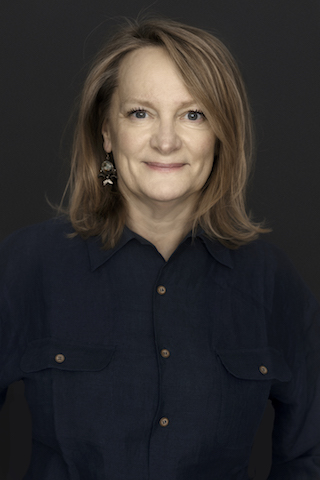 Porträtt Susanna Popova 2017